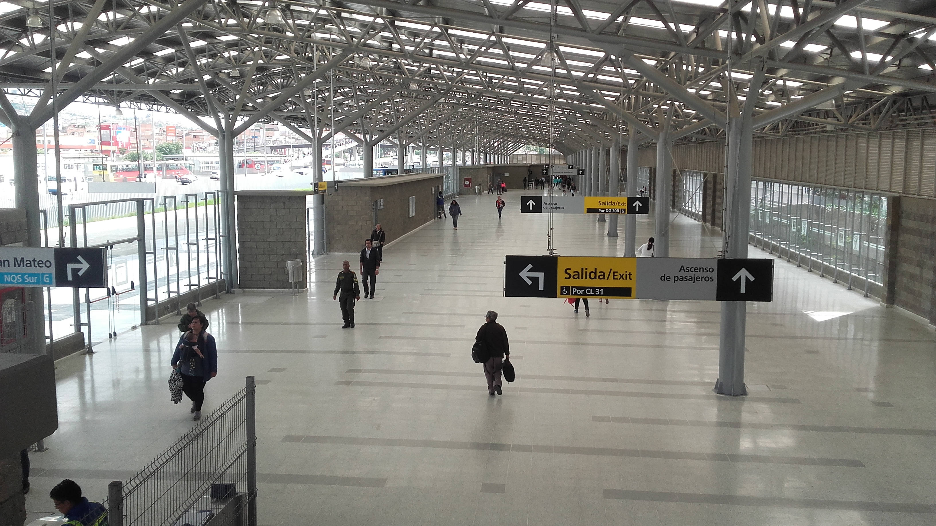 cncnnffnngngmgn